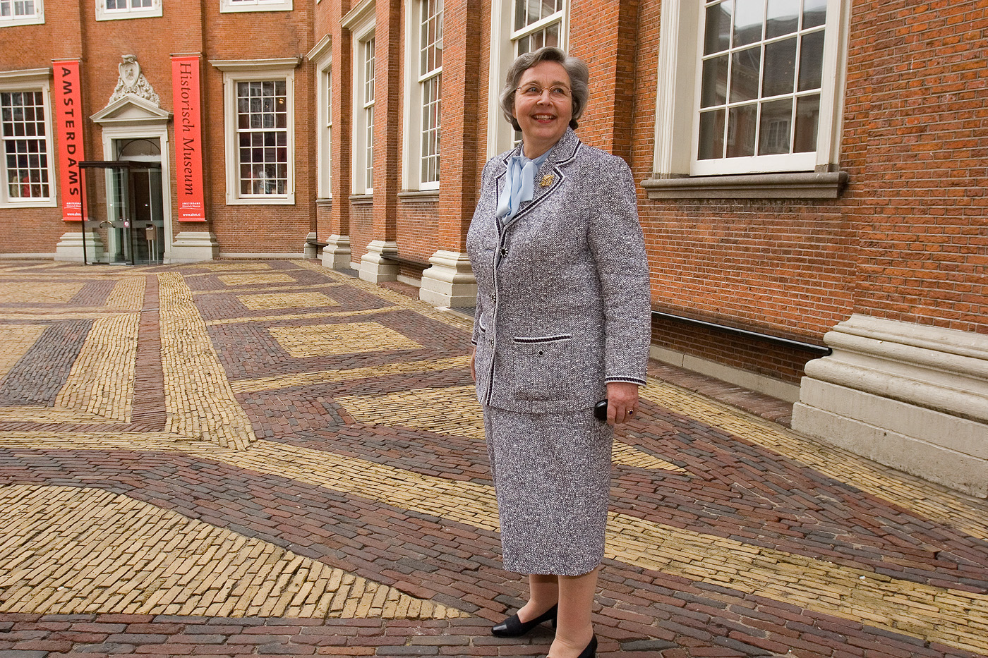 Portrait of Pauline Kruseman, museum director